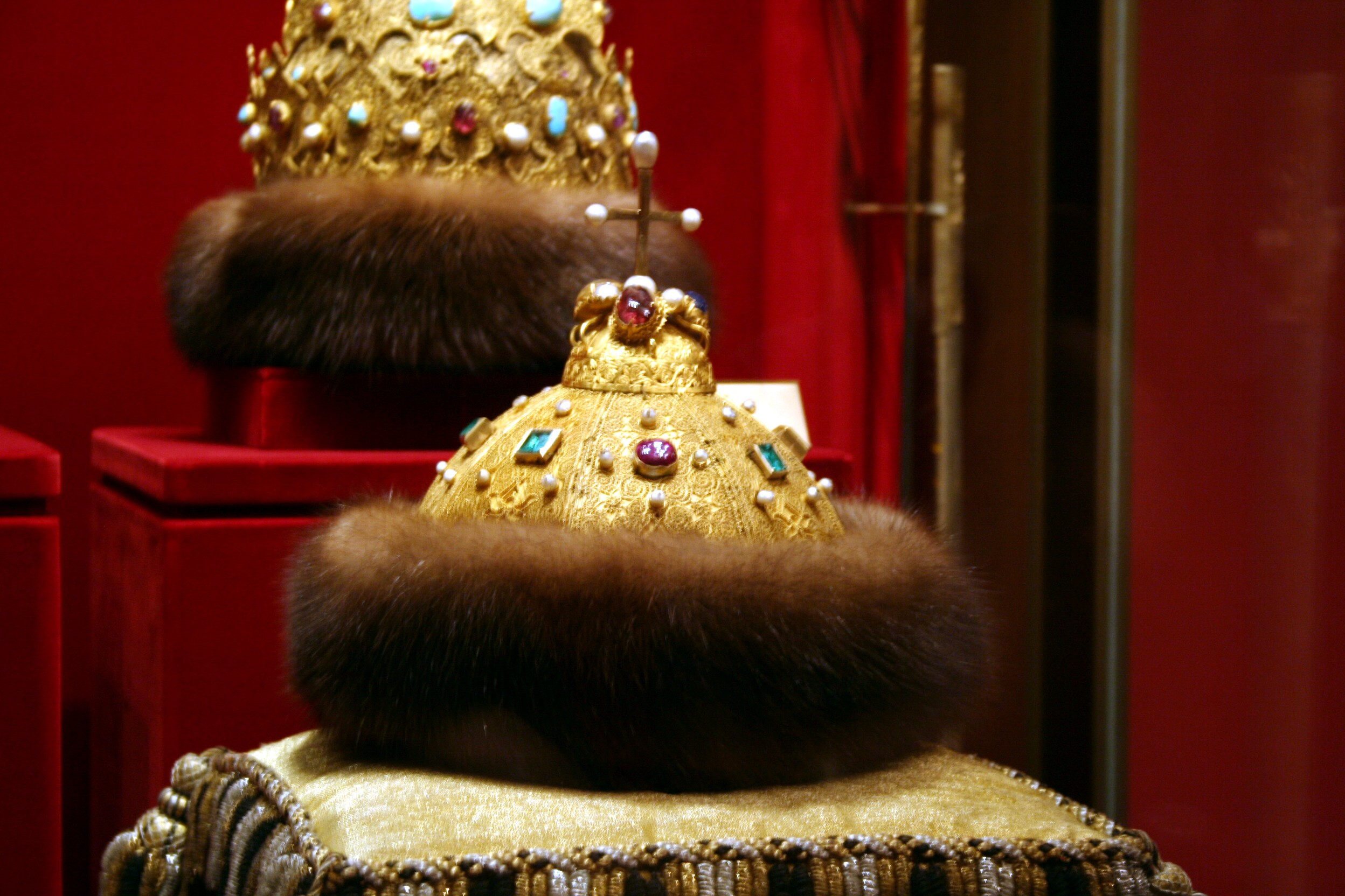 Museo de la Armería estatal, Oruzheynaya palata, en el Kremlin. Corona de Monómaco